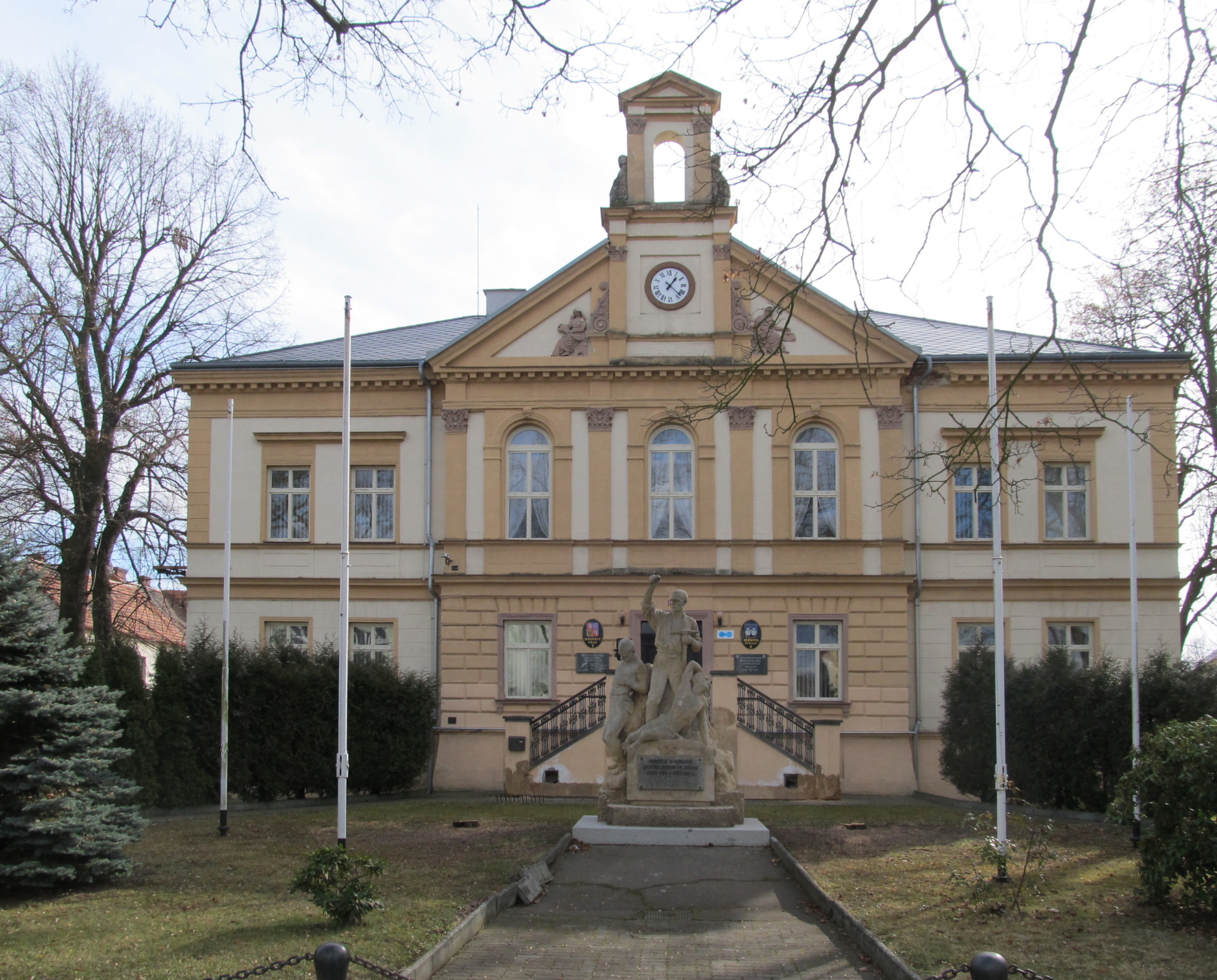 Nýřany - radnice